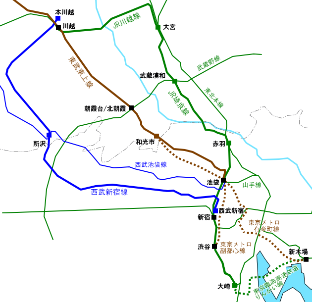 東京都心 - 川越間の鉄道各路線経路図